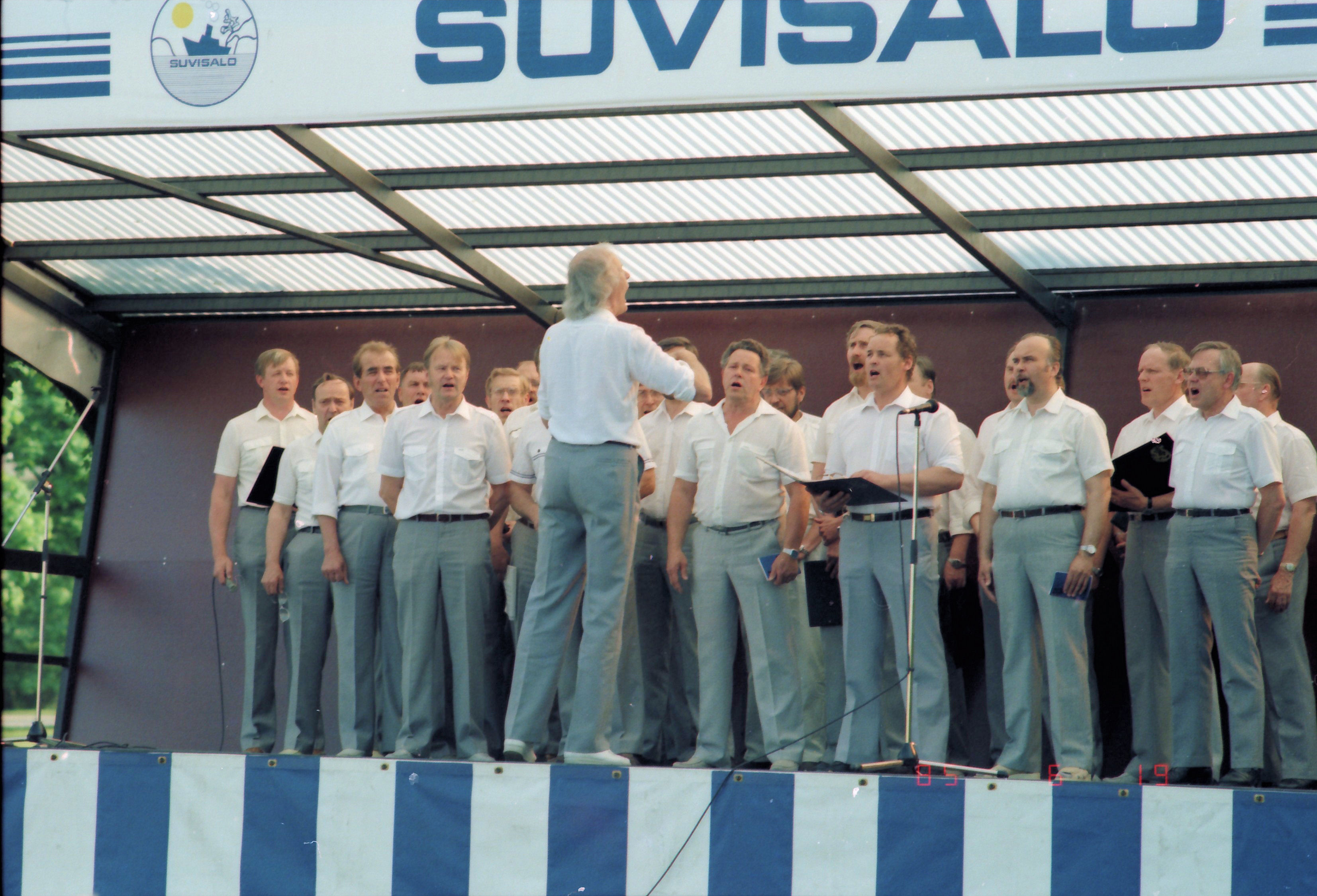 Salon Laulu-Sepot kuoro esiintymässä Salon torilla vuonna 1985